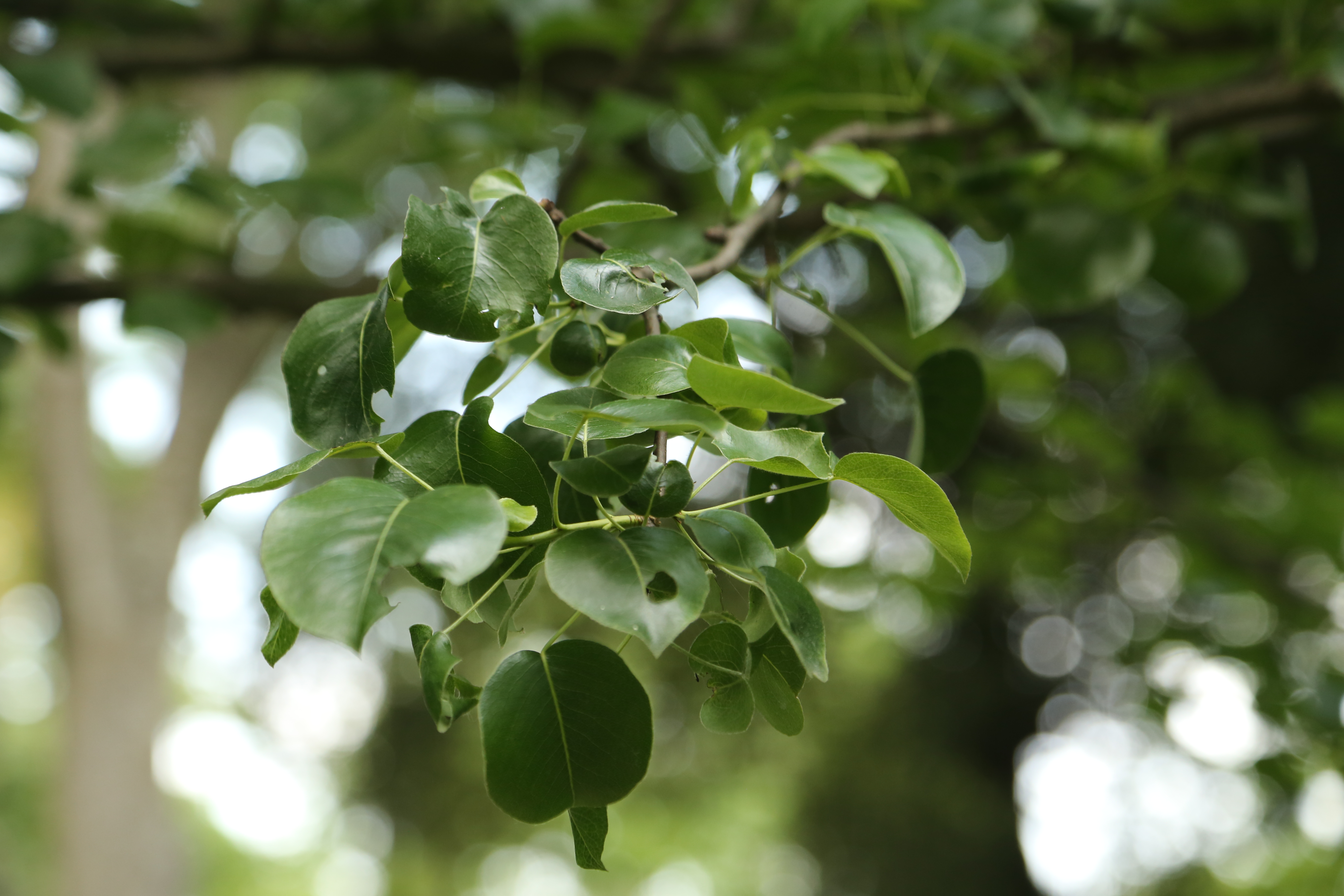 Pyrus pyraster foglie